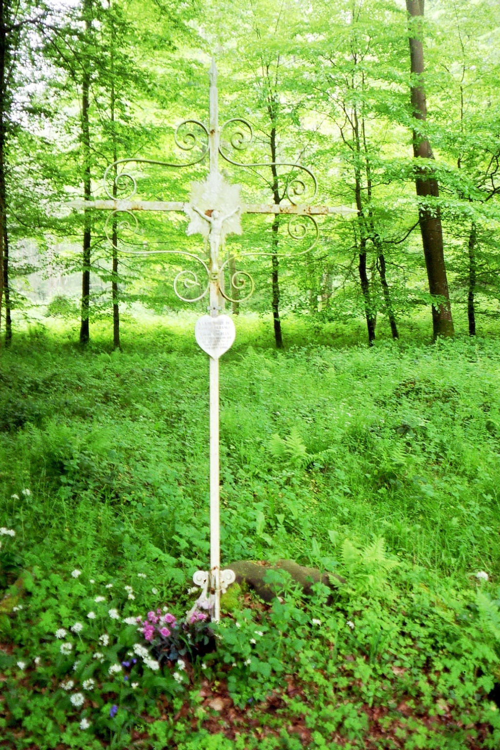 En mémoire de Gisèle et Louis noyés dans le carcahoux où ils s'étaient réfugiés lors de l'invraisemblable orage du lundi de Pentecôte 1936